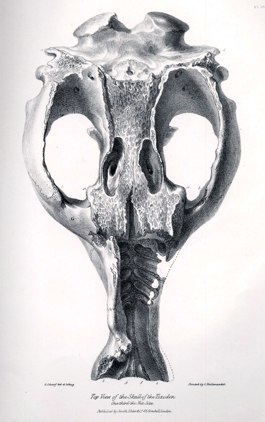 Tafel III mit dem Schädel eines Toxodons in The Zoology of the Voyage of H.M.S. Beagle